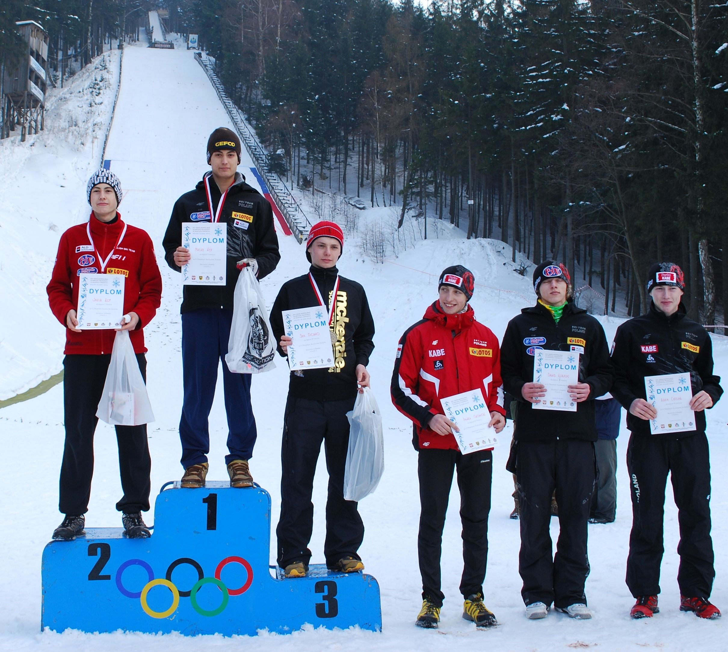 Zdjęcie przedstawia zwycięzców konkursu skoków narciarskich, który odbył się w 2010 roku w Lubawce.